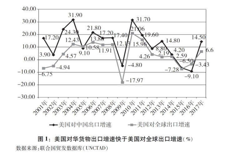 图1：美国对华货物出口增速快于美国对全球出口增速（%） （数据来自新华社）